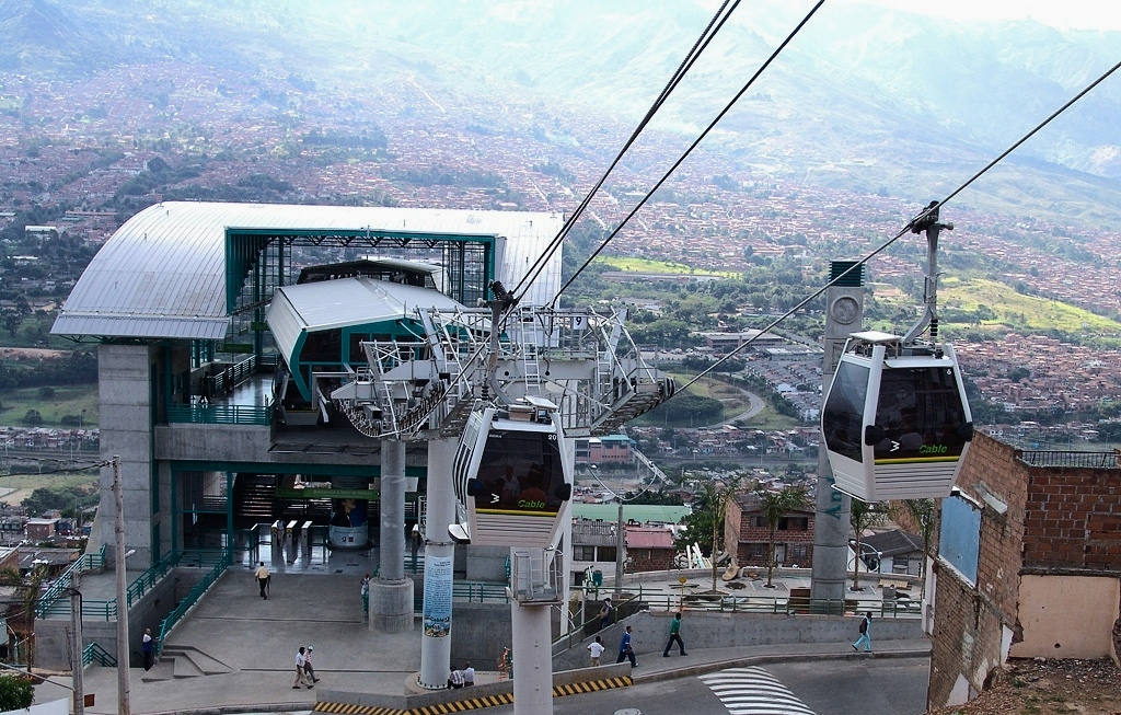 Estación Popular (Metro de Medellín)